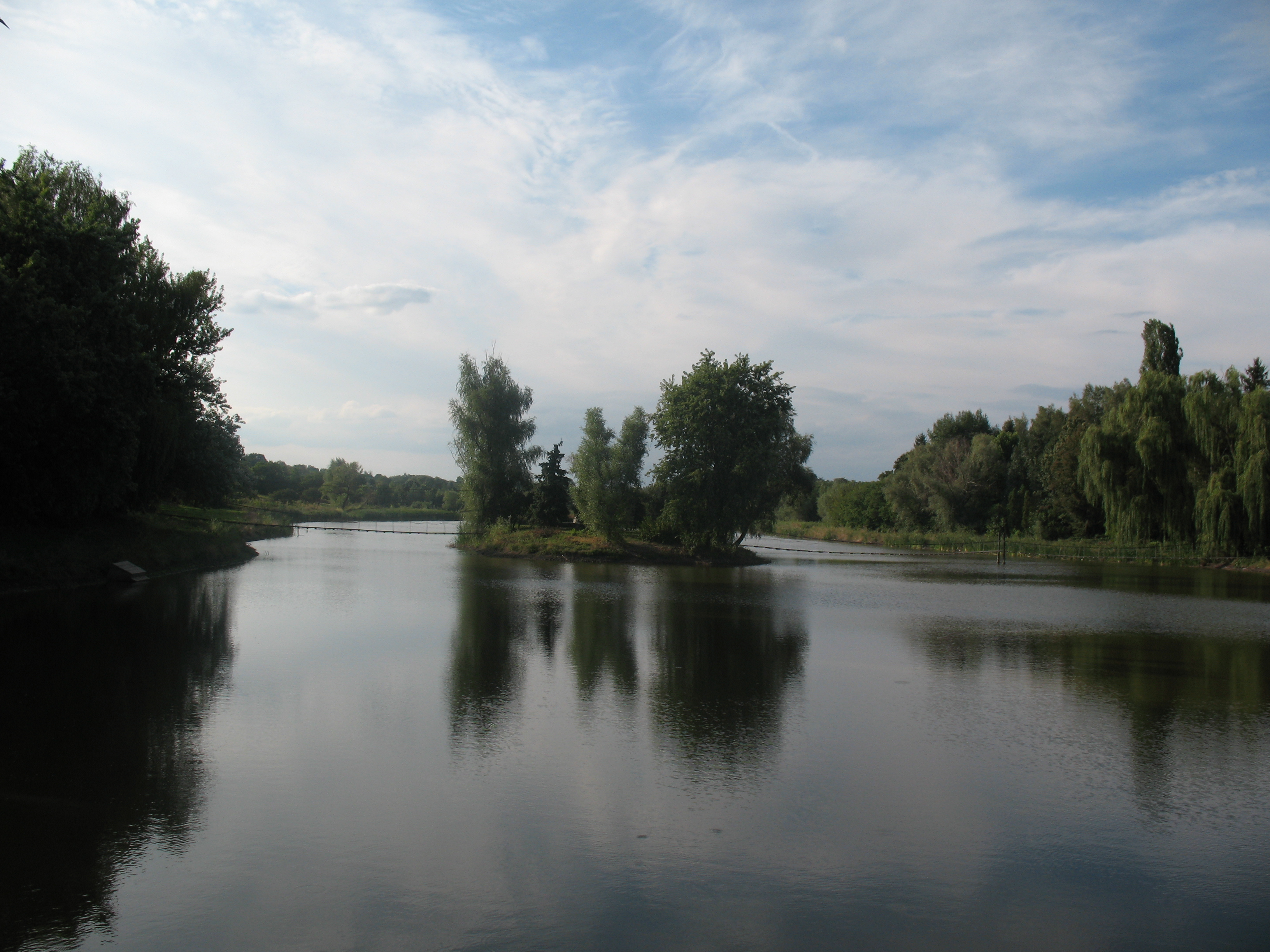 Лозоватський парк, Шполянський район, с. Лозоватка